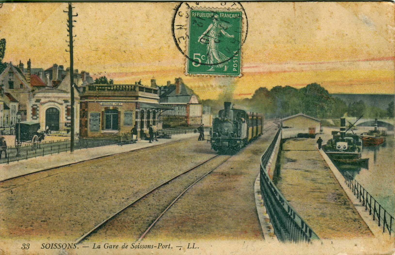 Carte postale ancienne éditée par LL, N°33 SOISSONS : La gare de Soissons-Port Gare terminus des Chemins de fer de la Banlieue de Reims